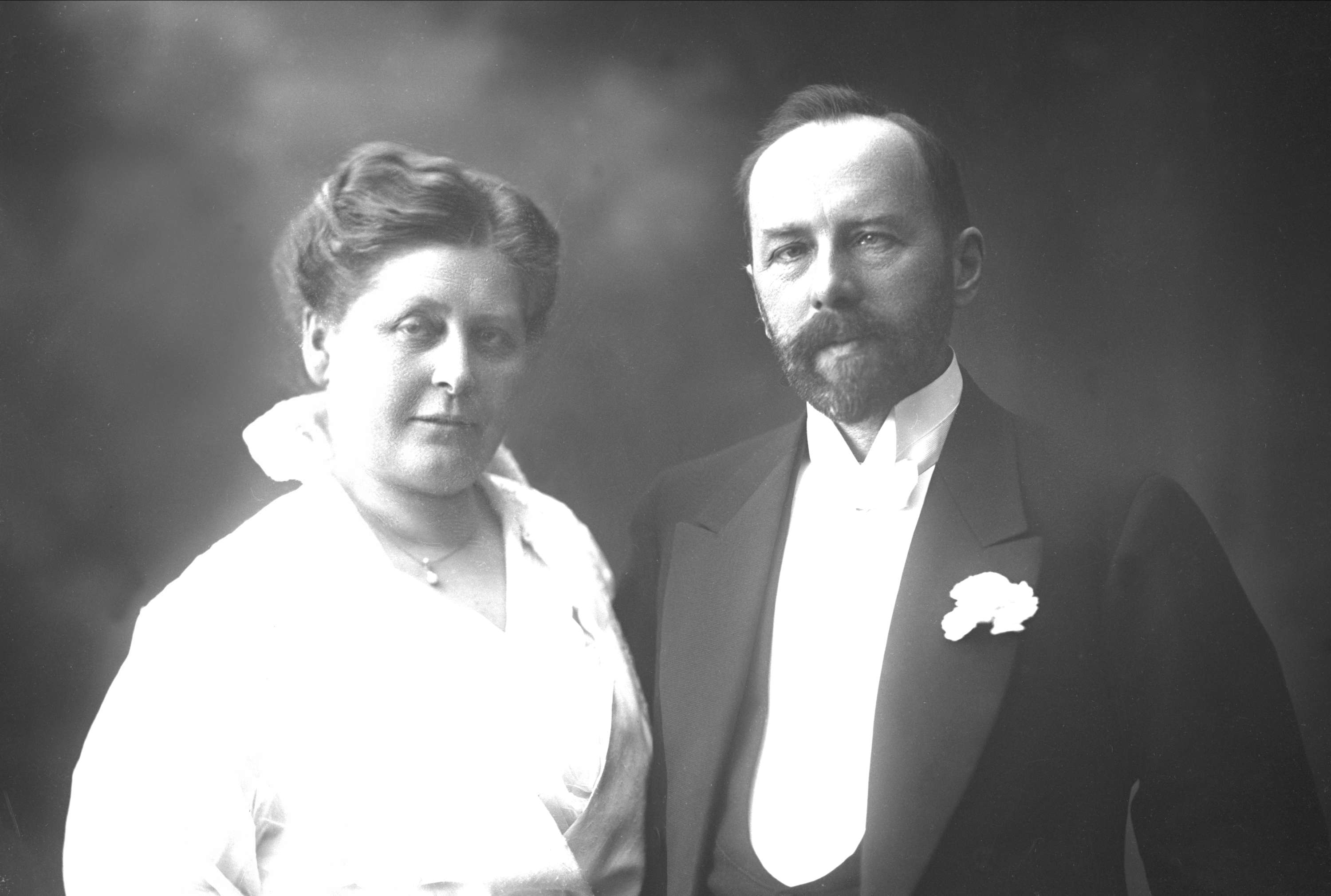 Forlegger Martin Nygaard d.e. og hans hustru Constance, fotografert av Gustav Borgen i 1914. Bildet tilhører Norsk Folkemuseum og er publisert på